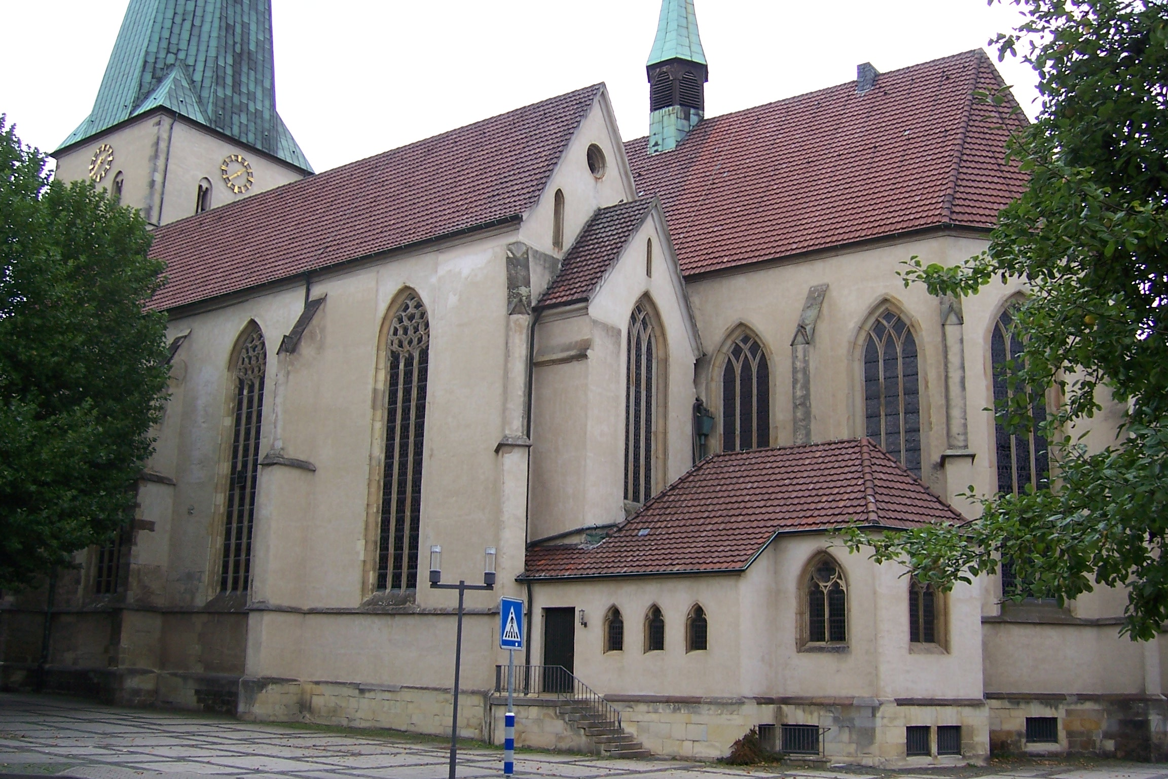 Remigius Borken NRW Germany Neugotische Osterweiterung